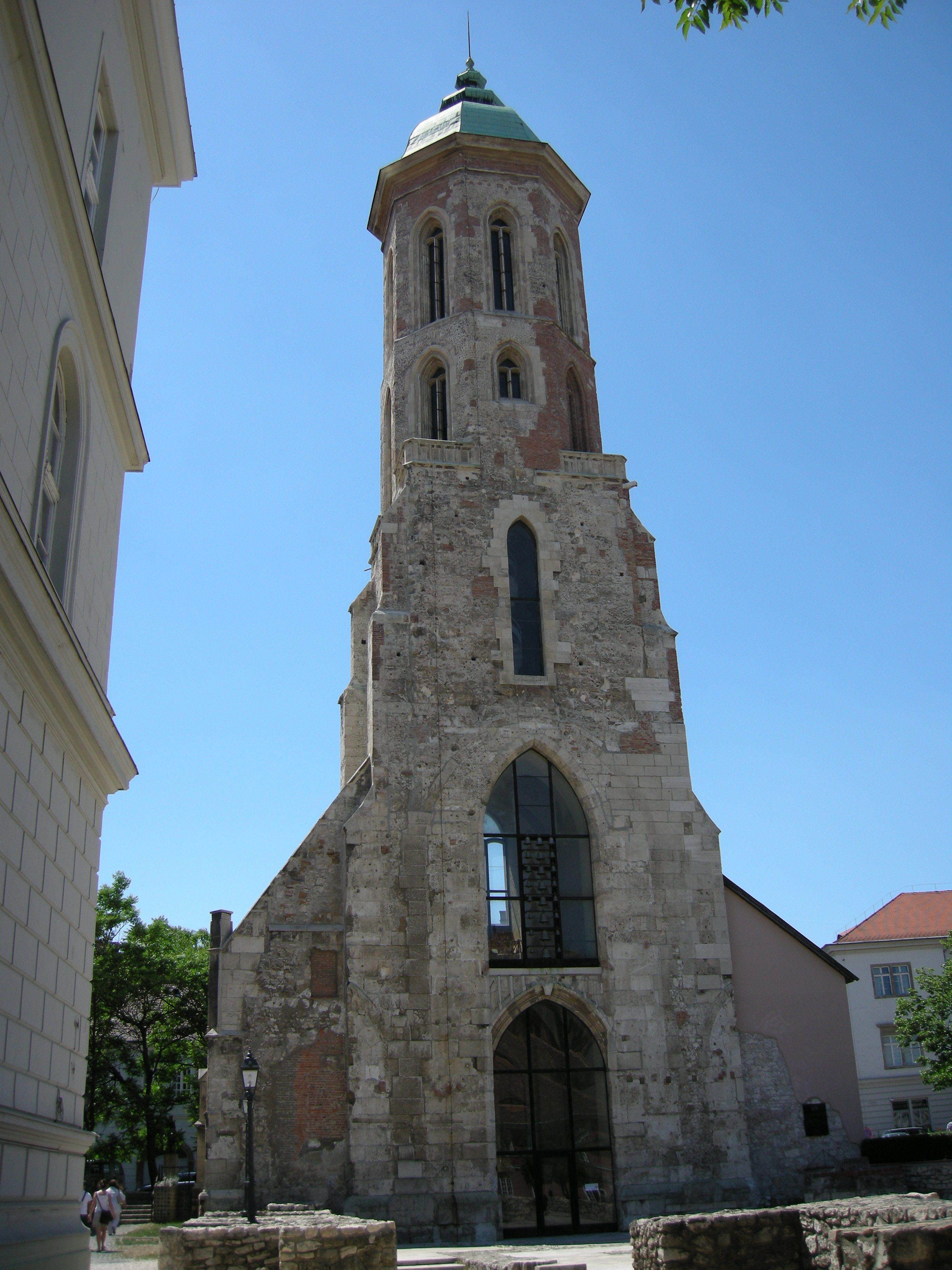 Budapest